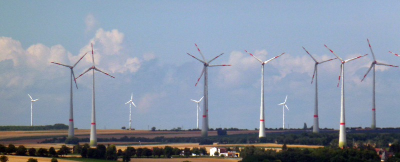 Windräder des Energieparks Wörrstadt. Aus dem ca. ? km Luftlinie entfernen Mommenheim fotografiert.